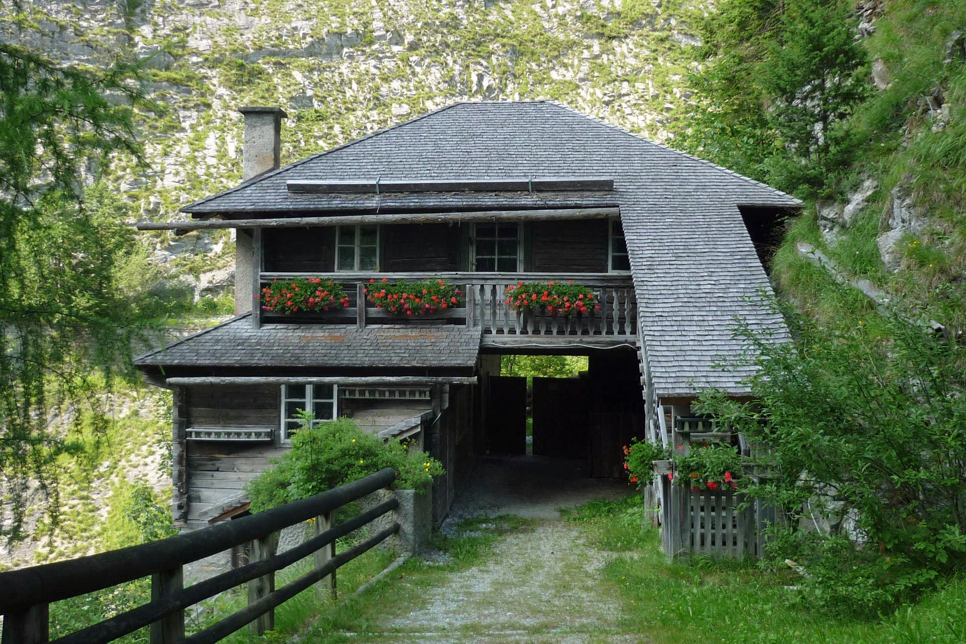 Alte Wacht am Eingang ins Großarltal